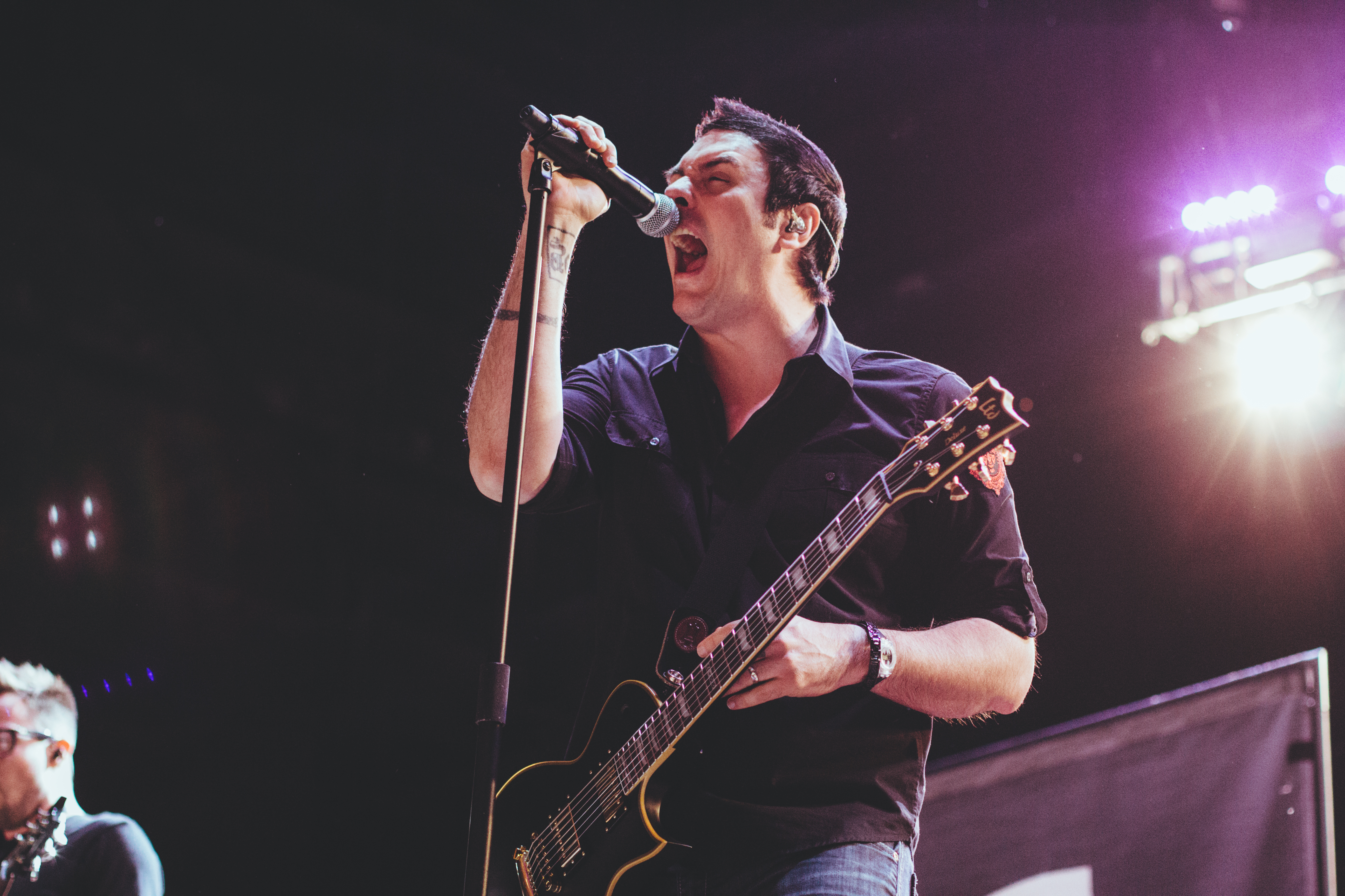 Breaking_Benjamin-3551